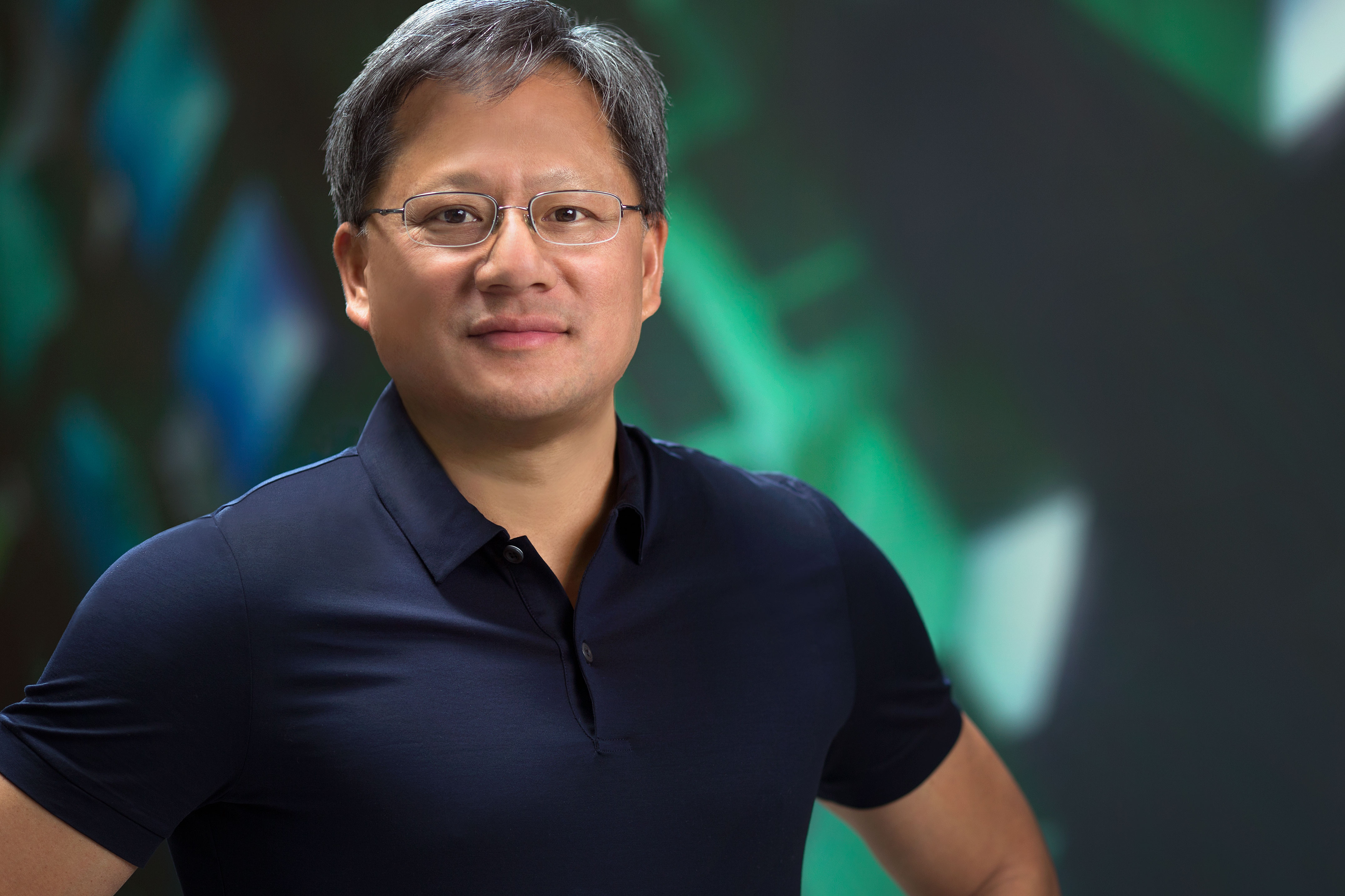 Jen-Hsun Huang Headshot